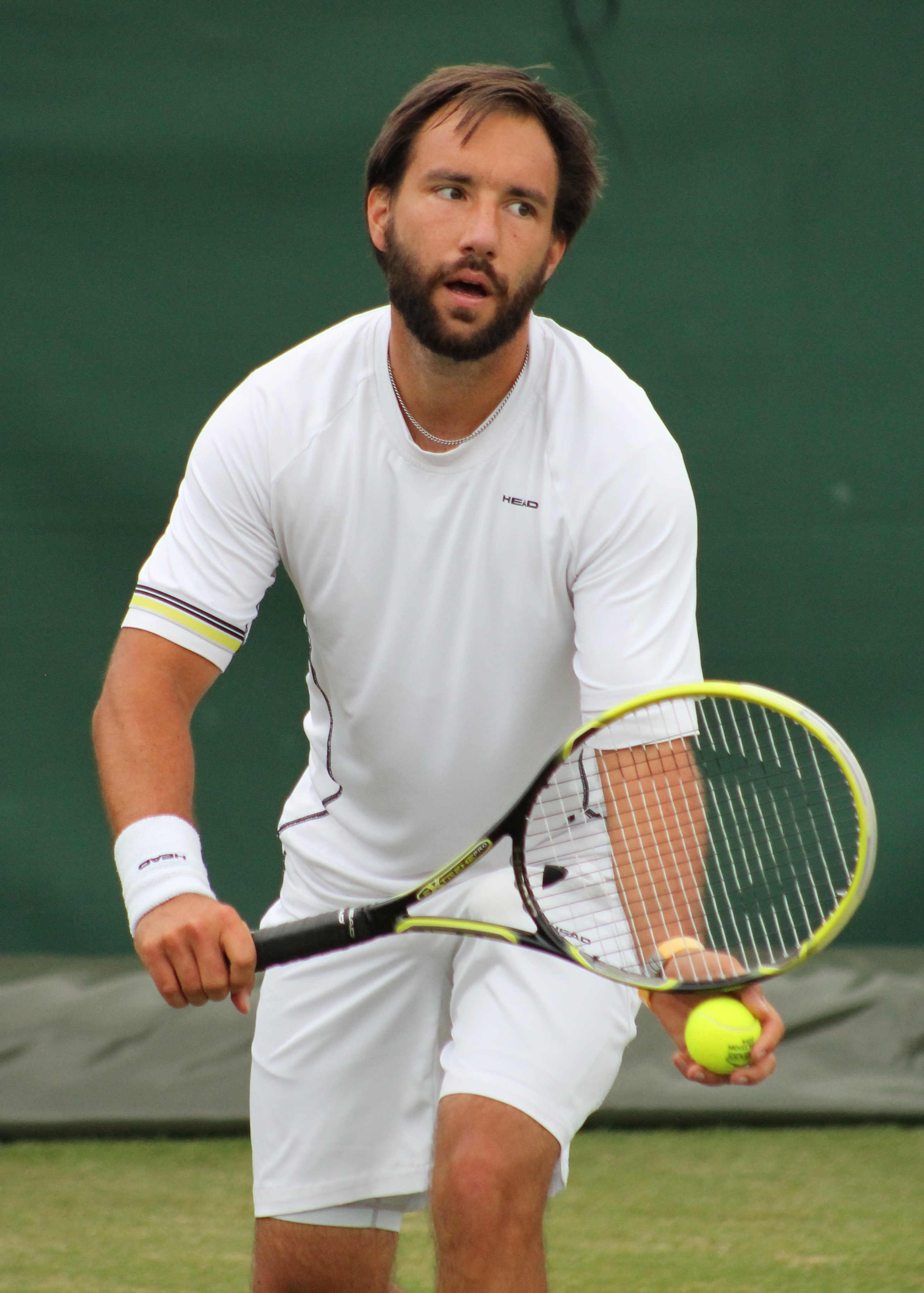 Satschko WMQ14 (1)